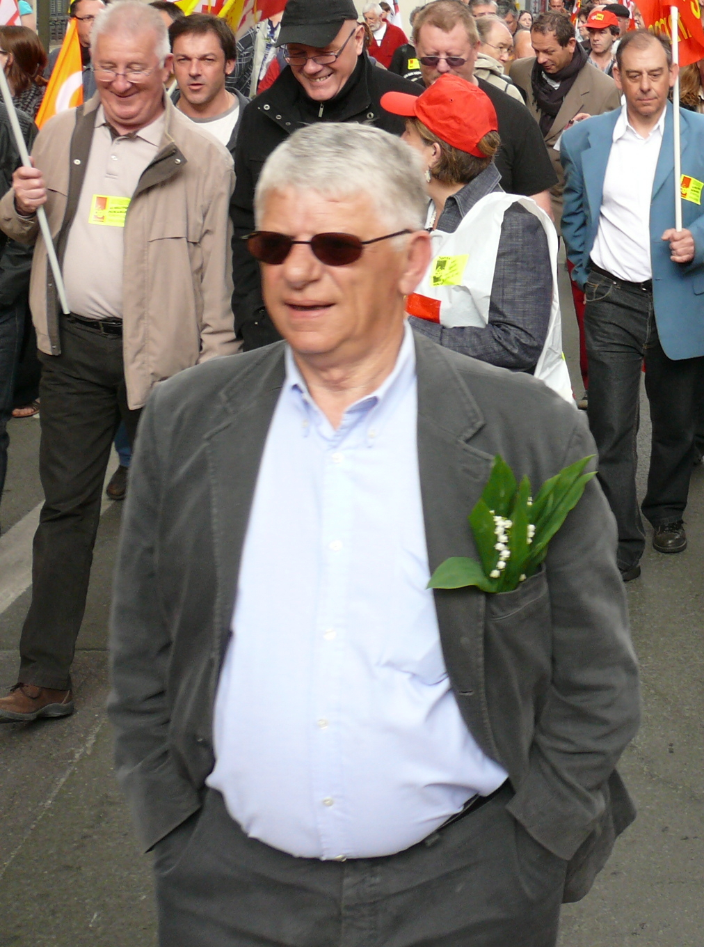 Manifestation intersyndicale du 1er mai 2010 à Amiens L'homme au premier plan avec un brin de muguet à la boutonnière est Maxime Gremetz